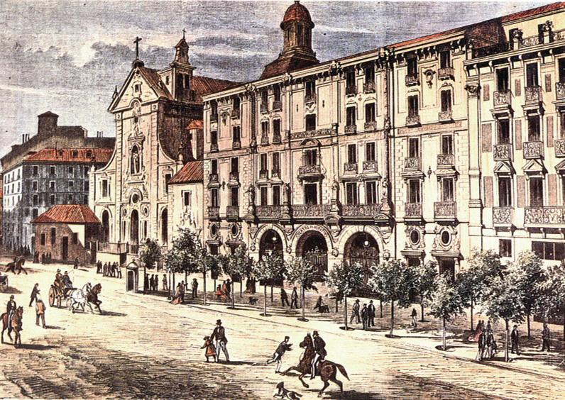 Fachada del teatro Apolo, sobre la calle Alcalá, en Madrid. Ya desaparecido. Fotografía de una litografía anónima de 1880